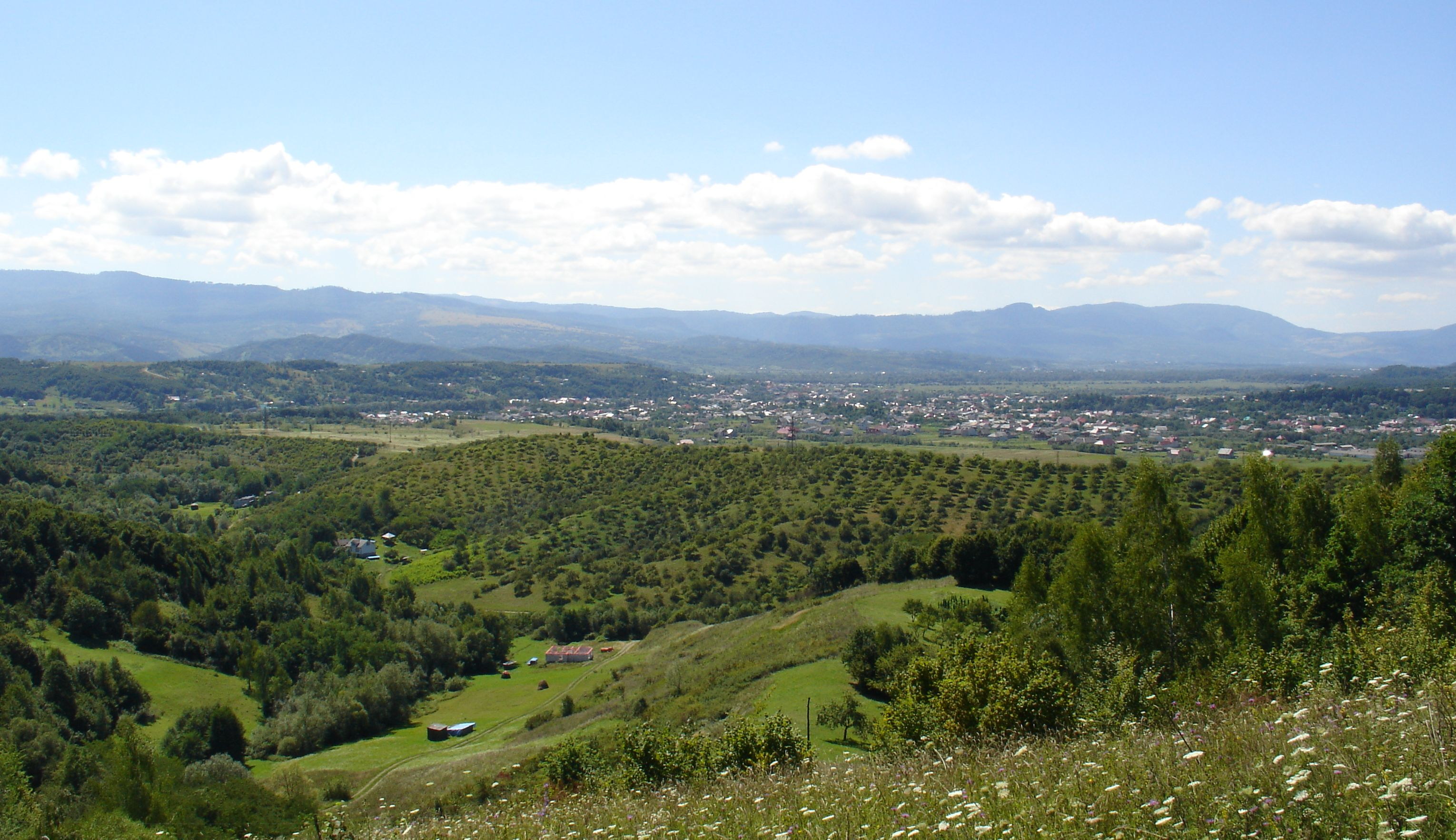 панорама Нижньої Апші (Закарпатська область)